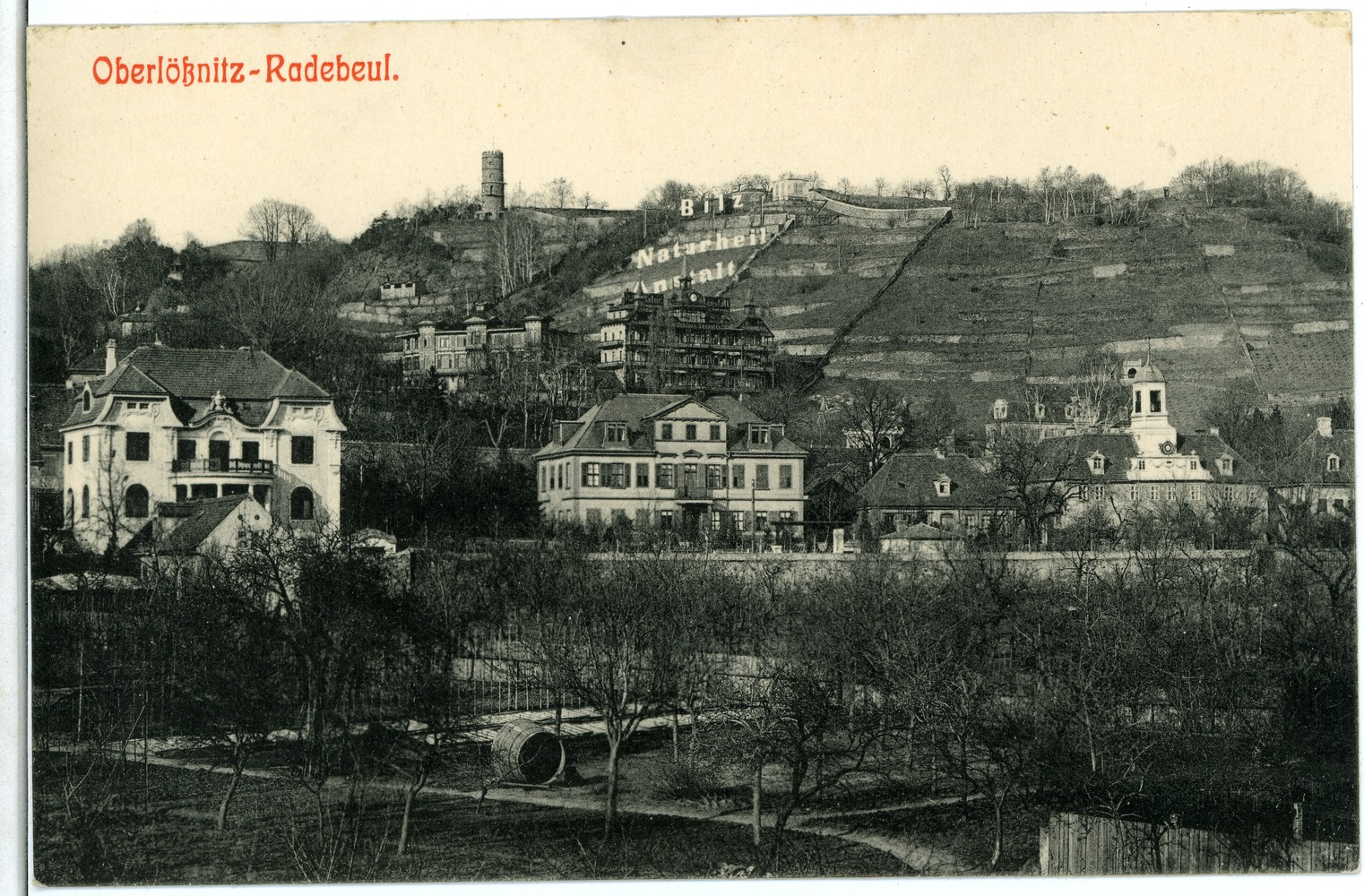 Oberlößnitz; Ansicht This postcard is from publisher Brück & Sohn in Meißen ( postcard has a unique number 02157 and is available in a higher resolution at the publisher. This images was uploaded in a cooperation project between Wikipedians and the publisher.